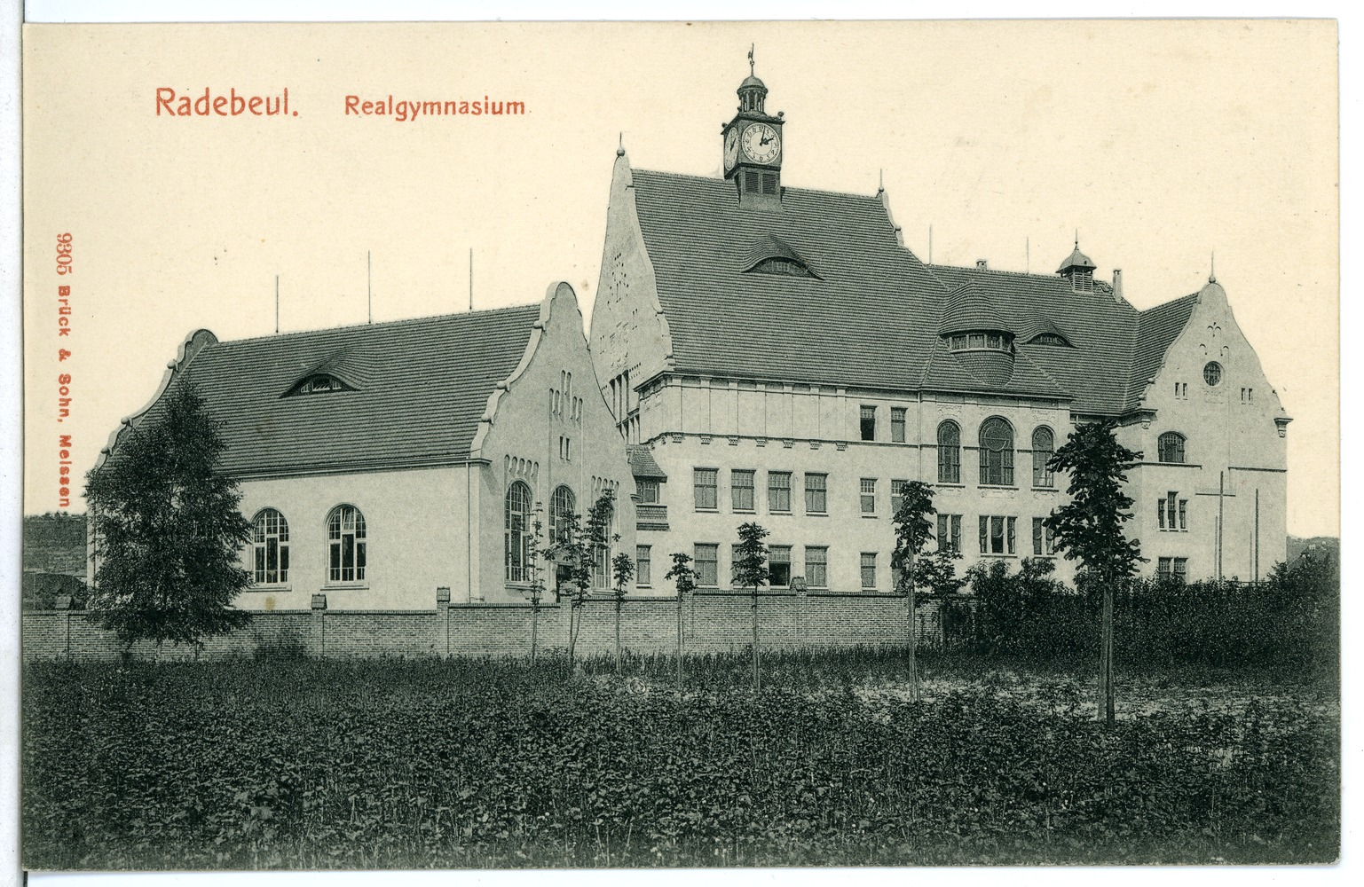 Radebeul; Realgymnasium This postcard is from publisher Brück & Sohn in Meißen ( postcard has a unique number 09305 and is available in a higher resolution at the publisher. This images was uploaded in a cooperation project between Wikipedians and the publisher.